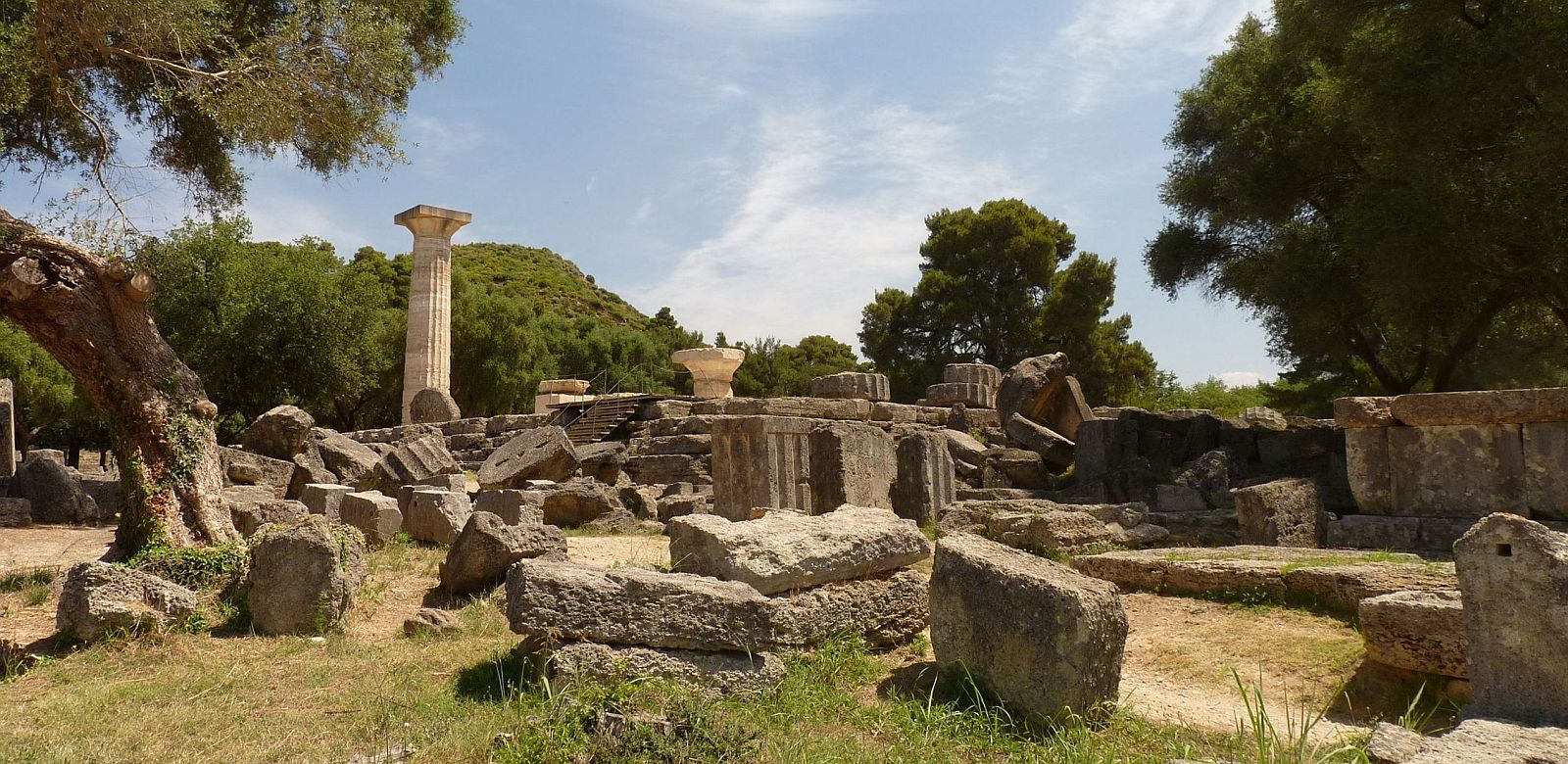 Olympia (Greek: Ολυμπία Olympía), a sanctuary of ancient Greece in Elis, is known for having been the site of the Olympic Games in classical times, the most famous games in history. You can use the images for free. But a link to - I would be happy :)